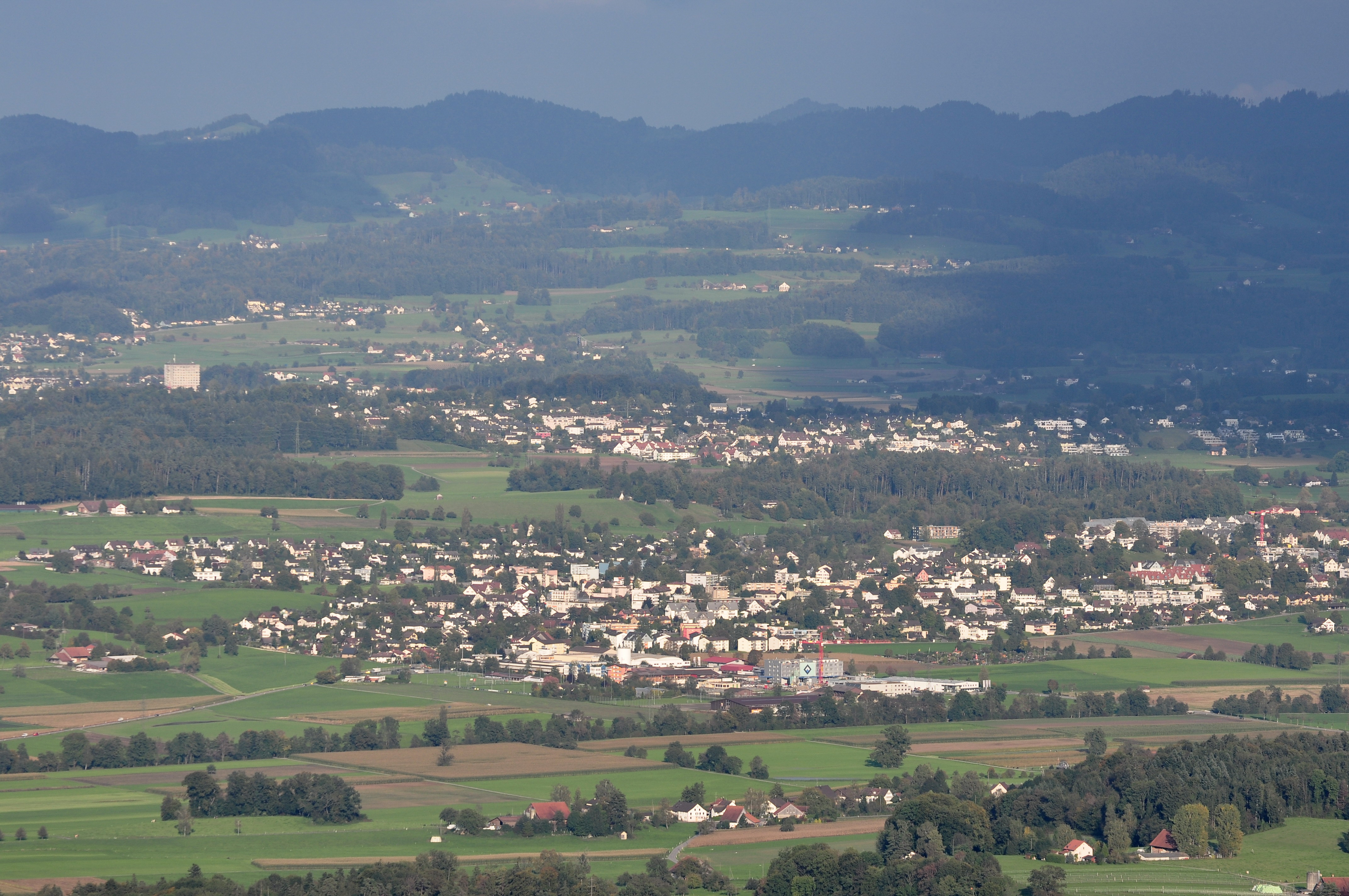 Gossau (Switzerland), as seen from Pfannenstiel Aussichtsturm, Wetzikon in the background to the left.